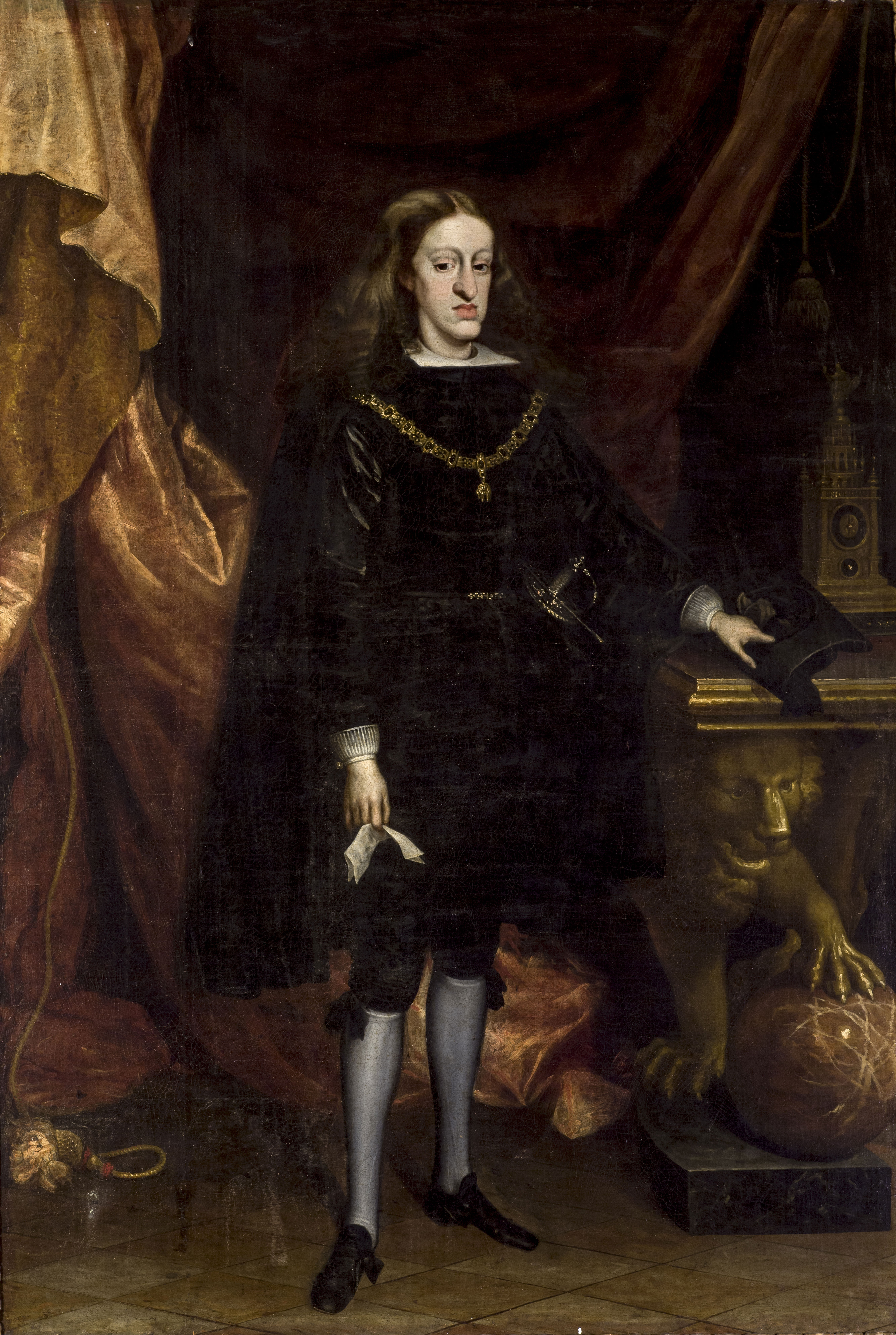 Retrato del rey Carlos II de España (1661-1700). Este lienzo es una variante ampliada del retrato de medio cuerpo del monarca custodiado en el Kunsthistorisches Museum de Viena y pintado a finales del siglo XVII por Juan Carreño de Miranda.